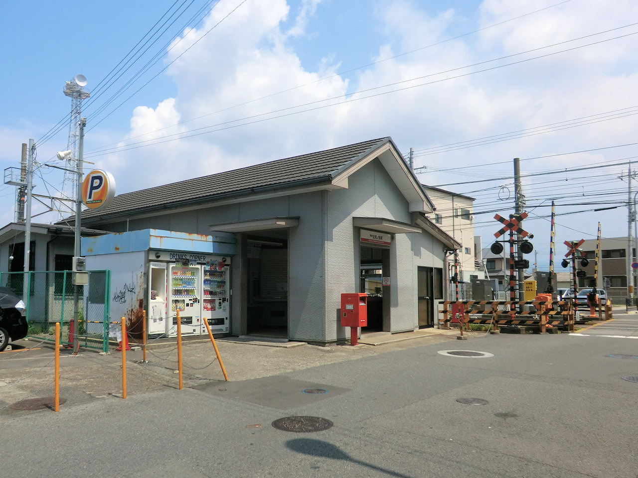 吉見ノ里駅